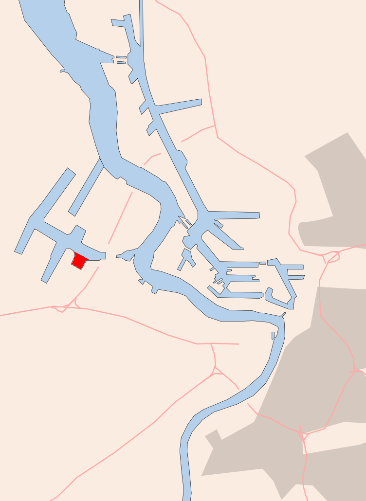 Antwerp , Zuidelijk Insteekdok